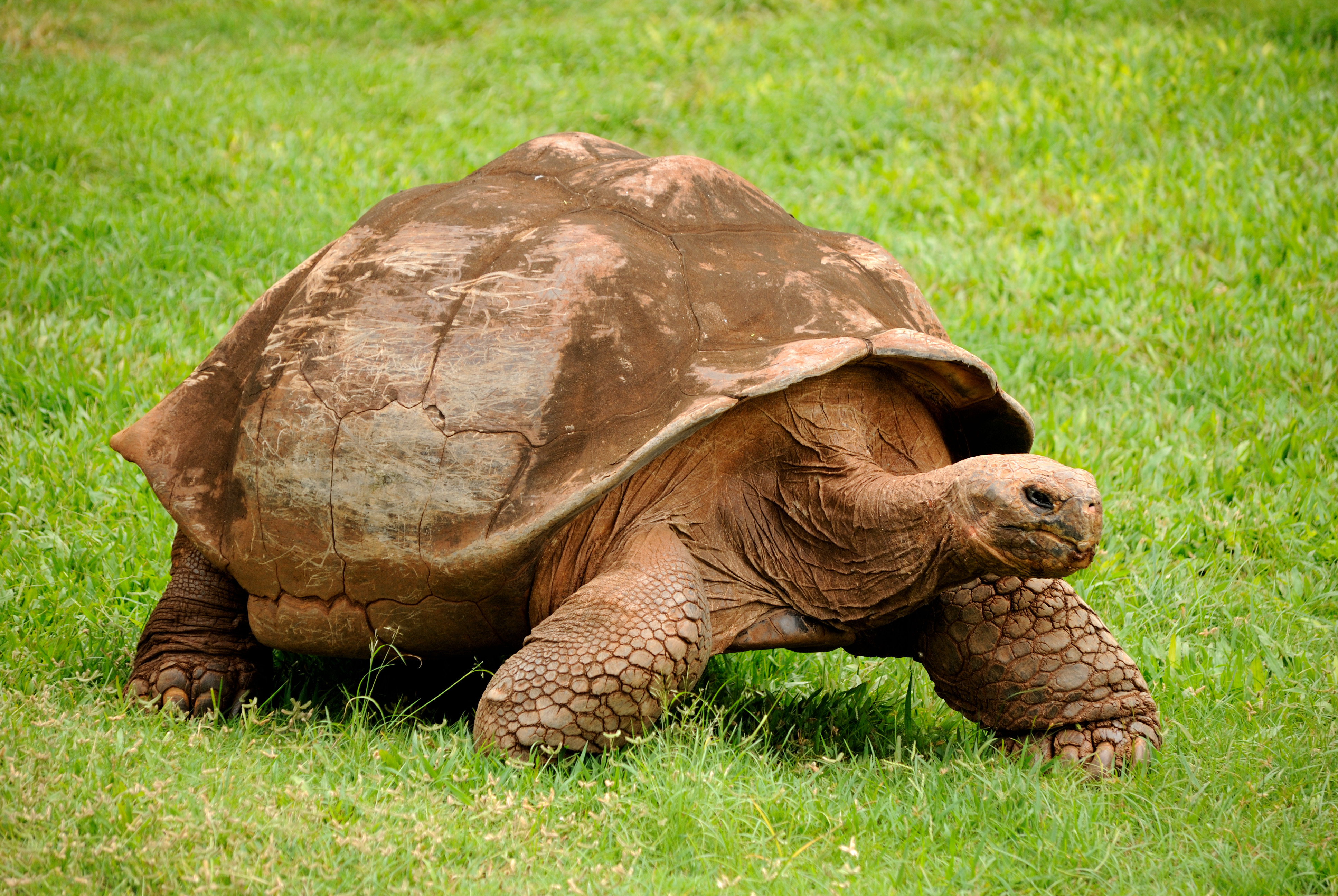 Galapagos Tortoise